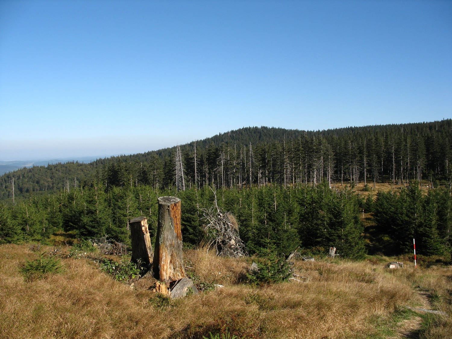 Pohled na Smrčinu - S vrchol (1304 m) na Šumavě ze svahu Hraničníku